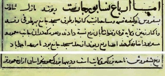 بریده‌ای صفحه‌ای از نسخه خطی کتاب تاریخ الحاکم که در آن اطلاعاتی درباره ارباع نیشابور و ربع بشتفروش آمده است